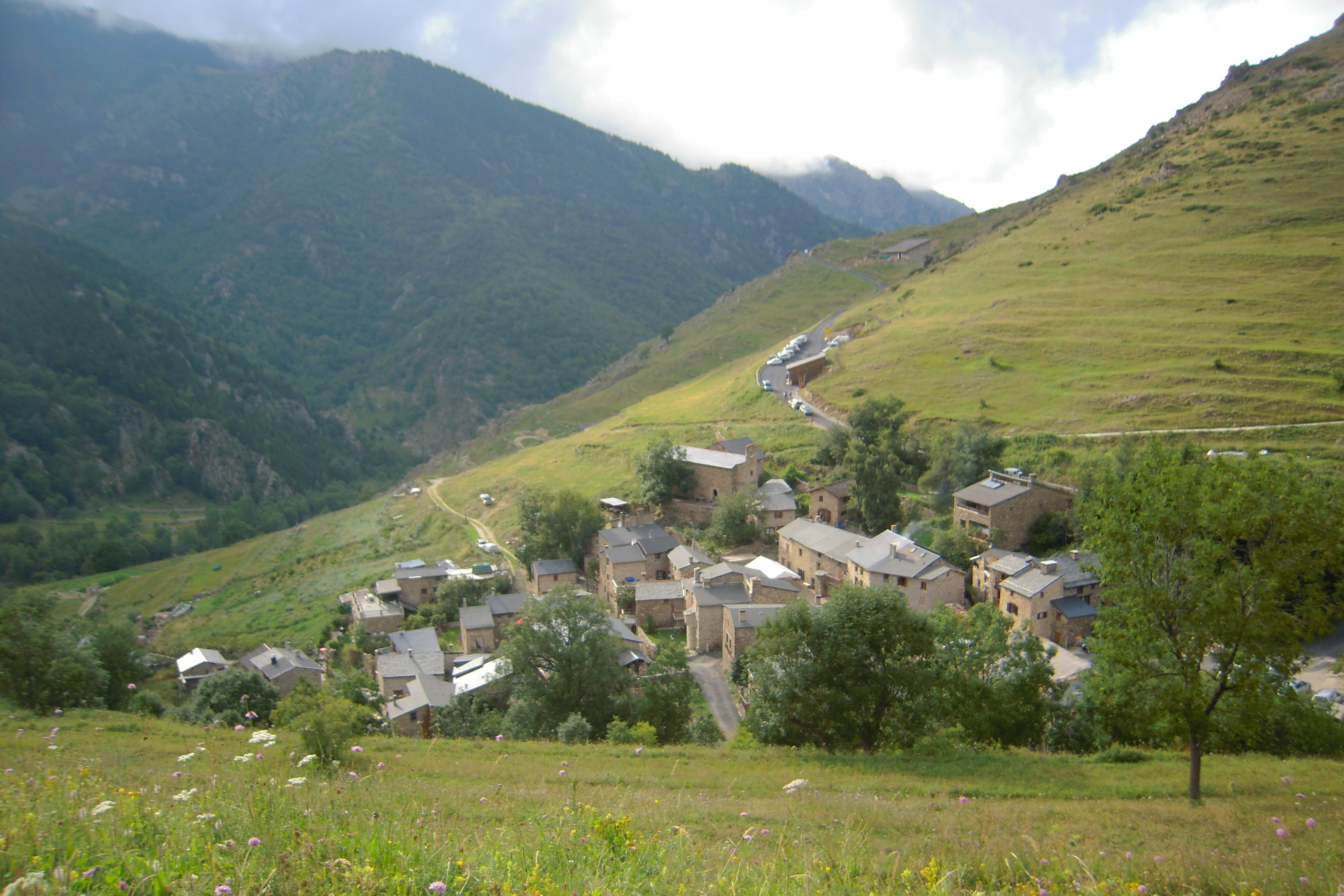 Vue générale du village de Mantet